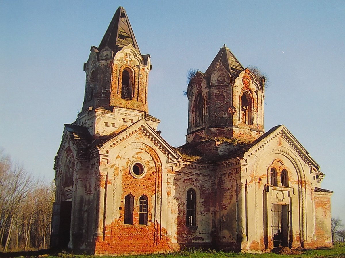 Свята-Узнясенская царква ў вёсцы Забычанне Касцюковіцкага раёна Магілёўскай вобласці Беларусі. Выгляд да рэстаўрацыі